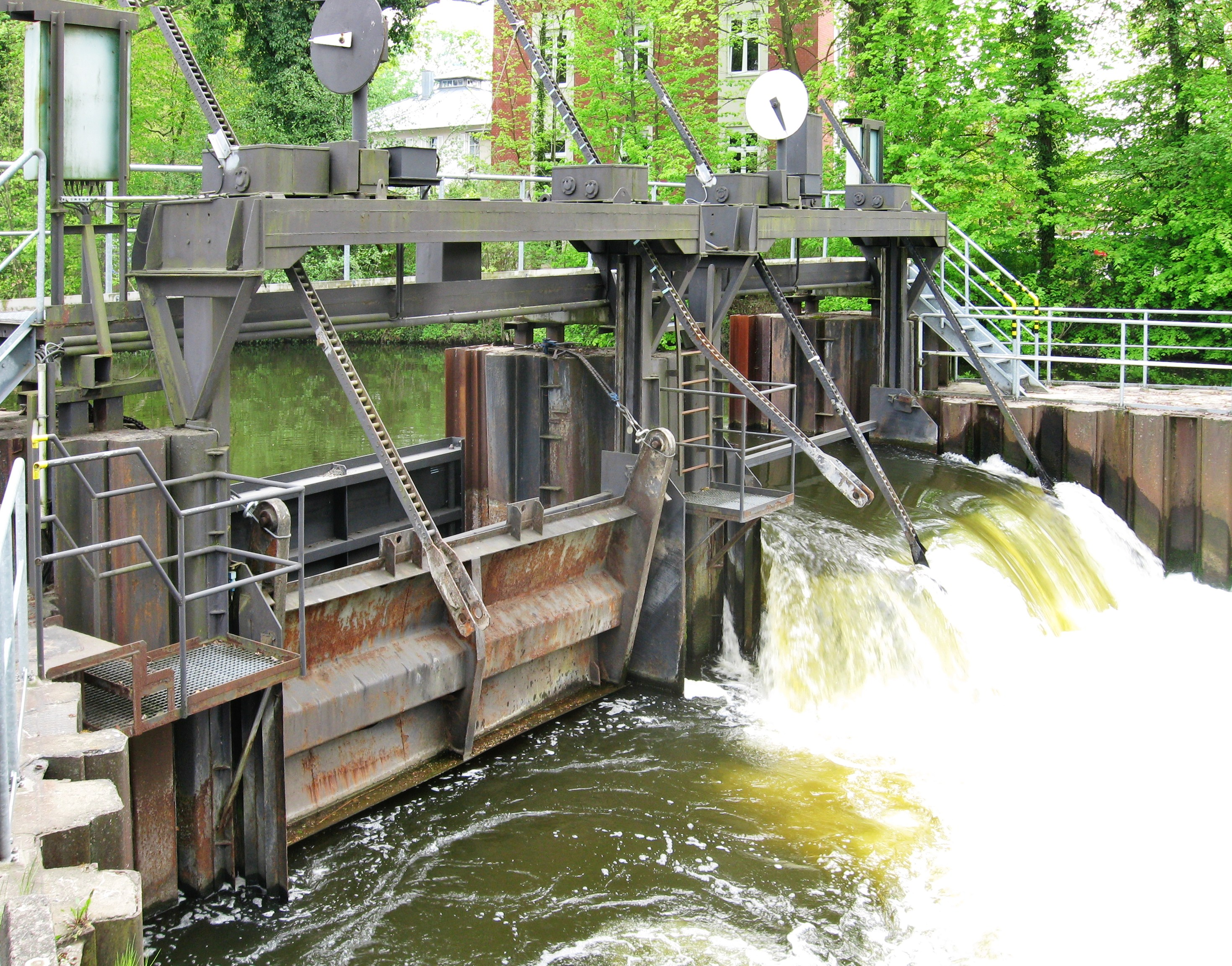 Wehr der Stabeschleuse bei Zernsdorf